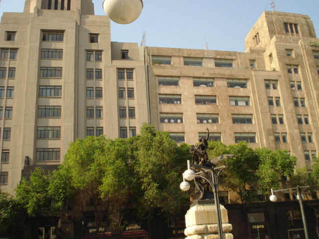 Edificio La Nacional en el Centro Histórico de la Ciudad de México.